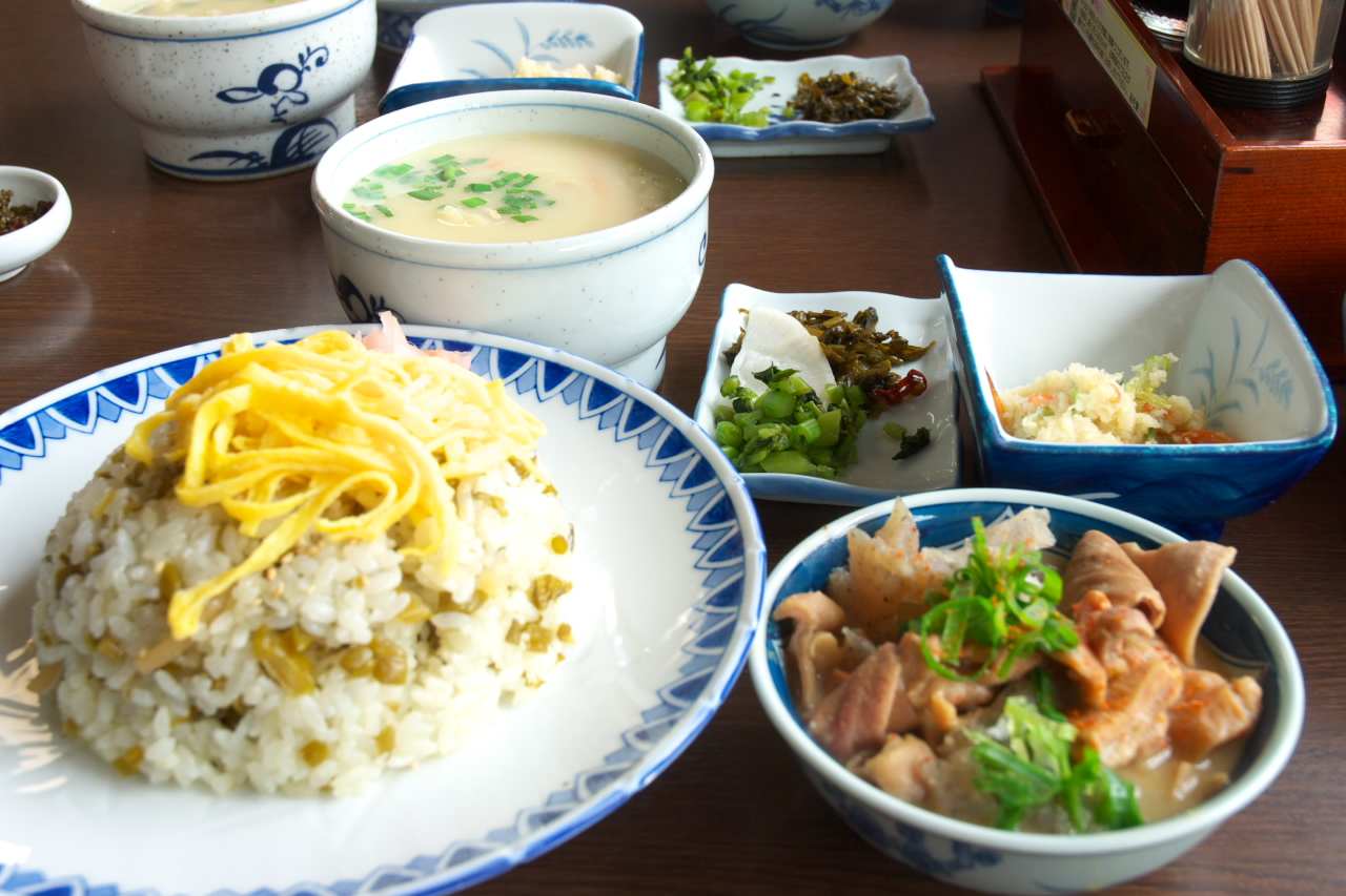 We eat a lunch in restaurant "Aso-ji" (mean the road of Aso). 昼食は国道沿いの「あそ路」でたかなめし定食をいただきました。 手前左がたかなめし。手前右は豚モツ煮。奥真ん中左寄りがだご汁。奥右はおからです。